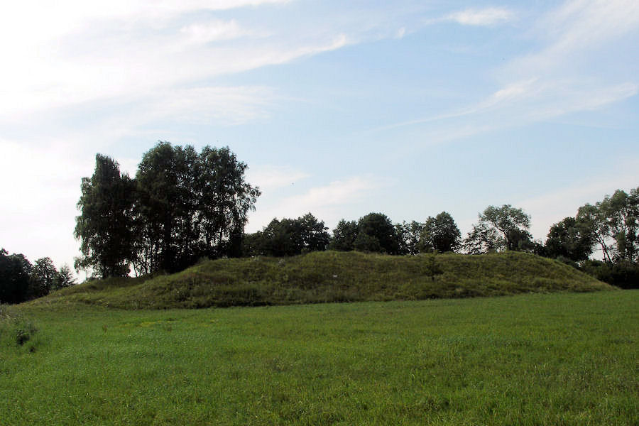 Wallburg in Mokrzk/Polen